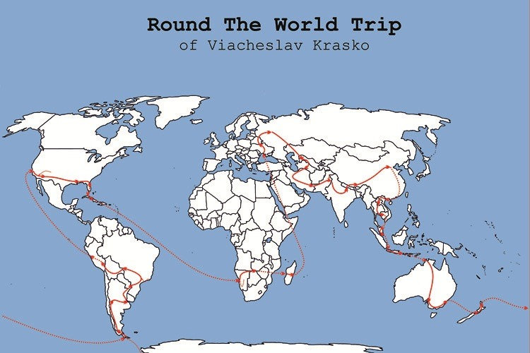 Карта кругосветного путешествия Красько